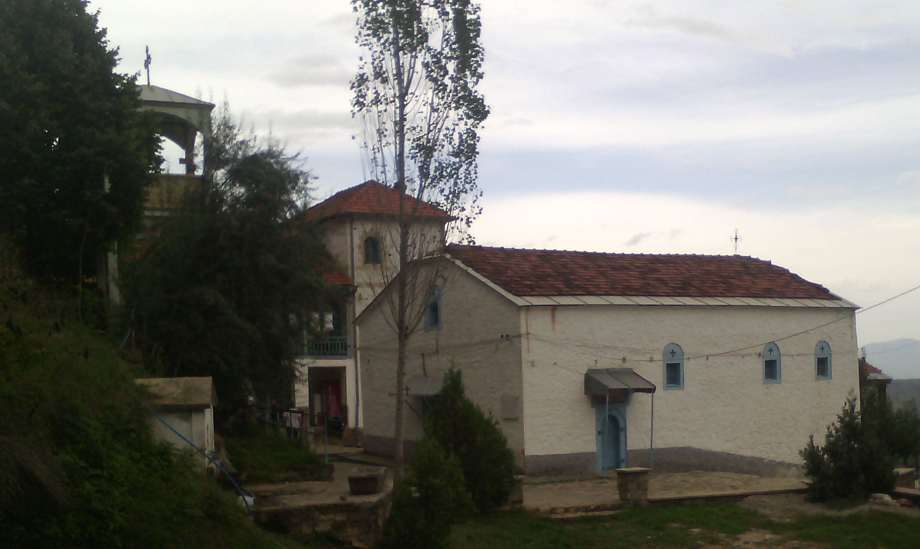 Црквата „Св. Спас“ кај Крушево